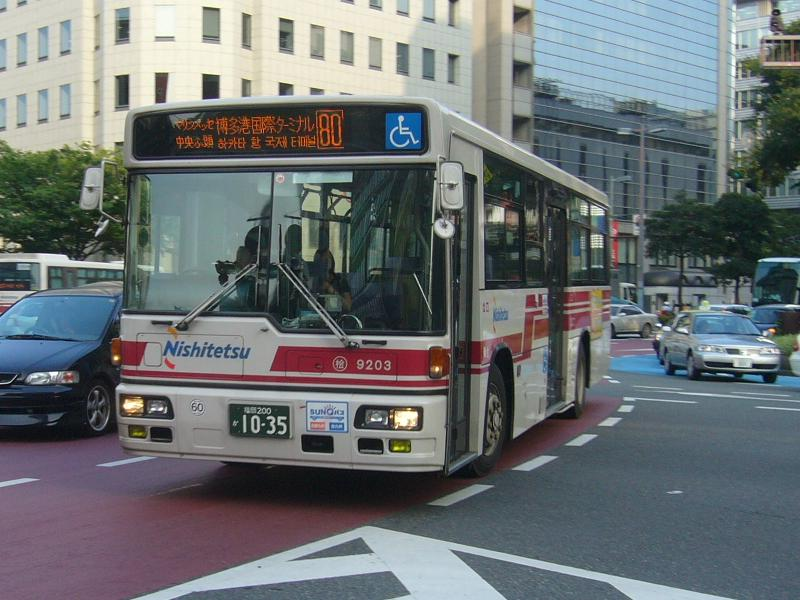 登録番号 福岡200か10-35 西日本鉄道桧原営業所所属 車番9203 2007年7月30日 天神北交差点にて撮影